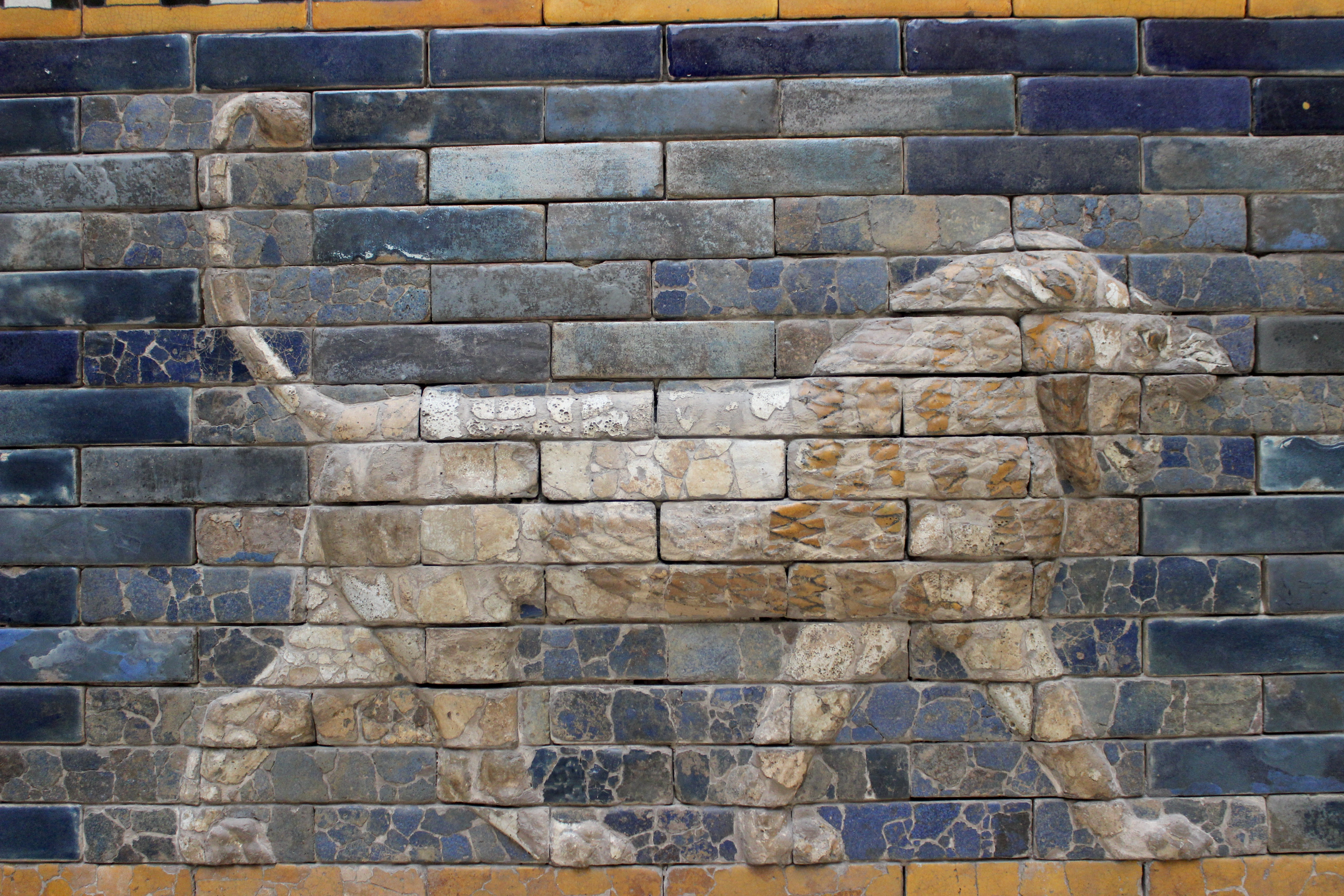 Berlín. Pergamon Museum. León de la Puerta de Ishtar.